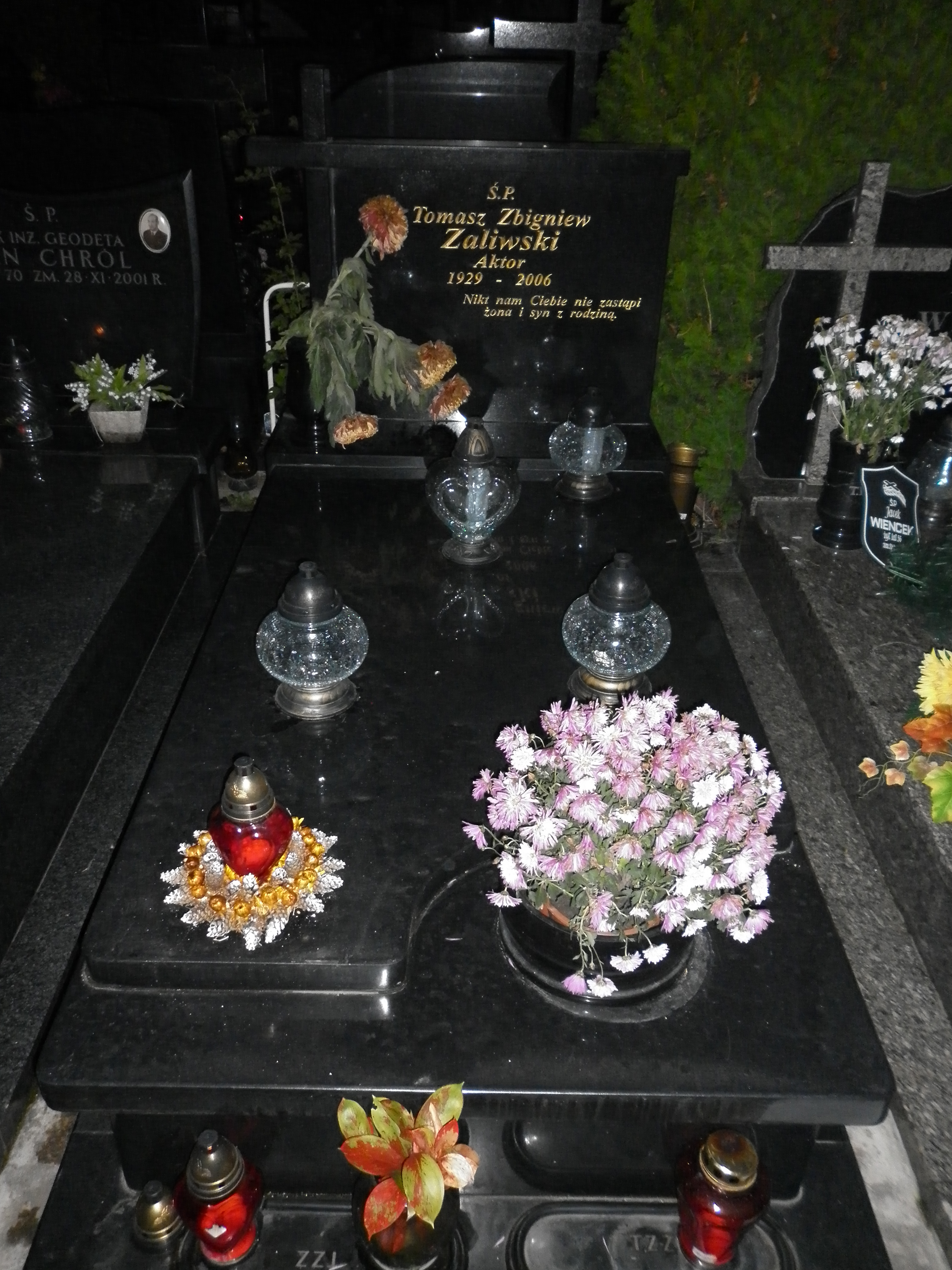 Grób Tomasza Zaliwskiego na Cmentarzu w Pyrach